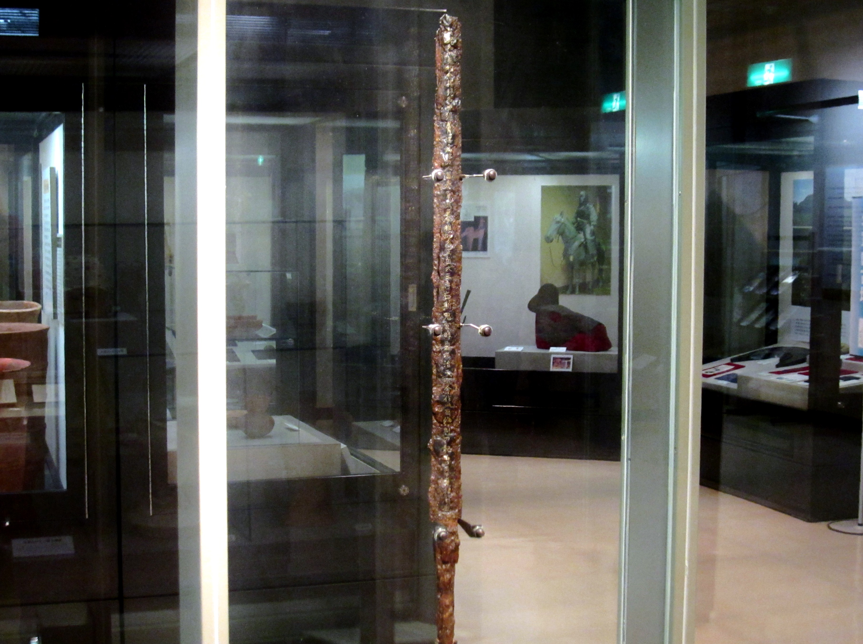 Inariyama Schwert mit 115 in Gold eingelegten Schriftzeichen, 5.Jh n.Chr.